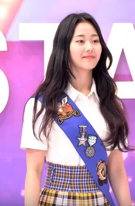 4일 오후 서울 마포구 상암동 tbs 오픈스튜디오에서 ‘tbs 팩트인스타 - ‘체리블렛’편 녹화가 펼쳐져 체리블렛 채린이 포토타임을 갖고 있다.